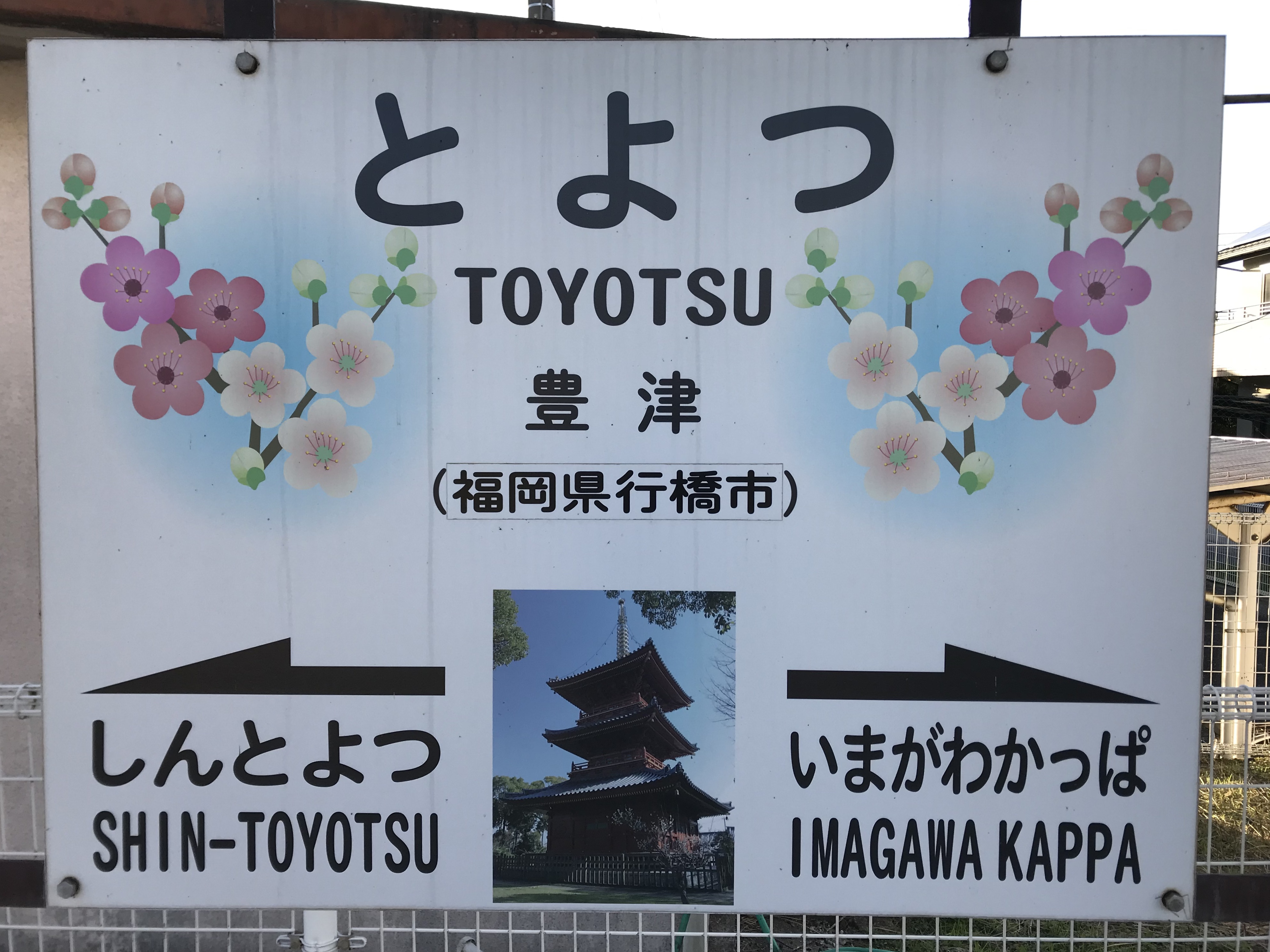 豊津駅の駅名標。イラストは豊前国分寺の三重塔